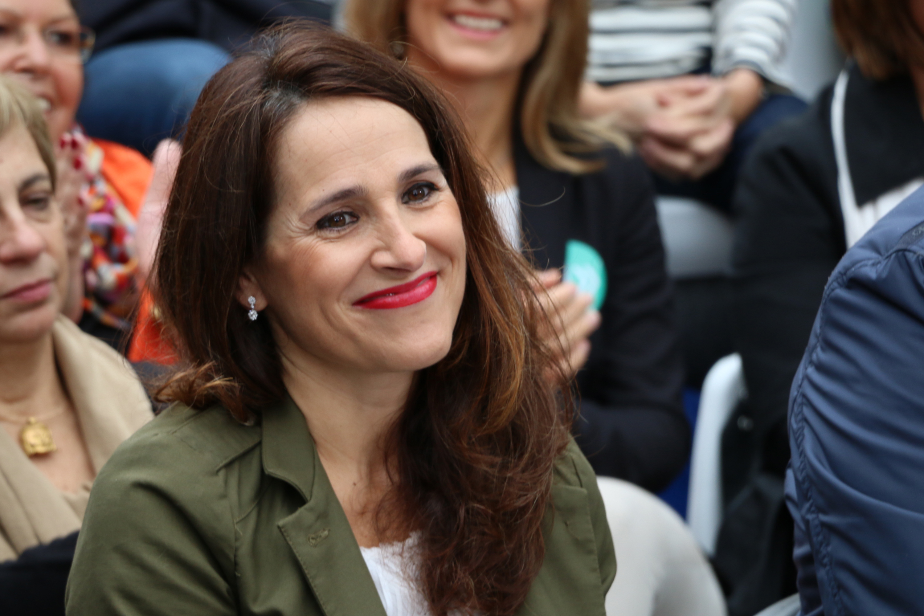 EAJ-PNVko hautagaiak Donostiako Ekitaldian